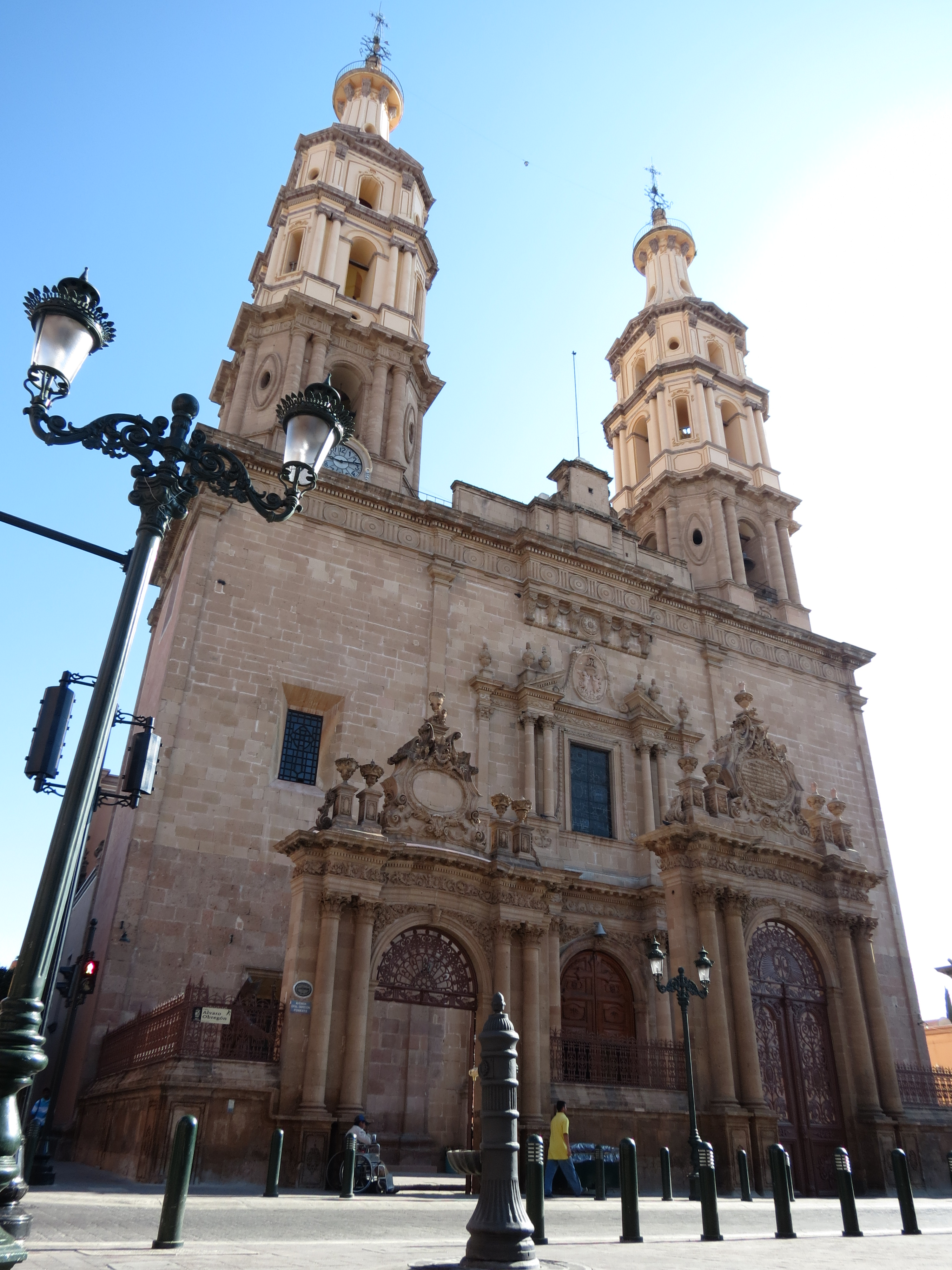 Template:Catedral-Basílica de Nuestra Madre Santísima de la Luz en León, Gto.